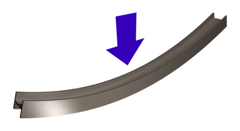 Benging an I-beam